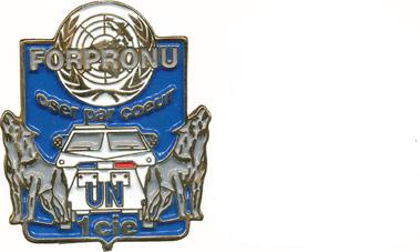 insigne de la 1ère compagnie (FORPRONU), Oser par coeur, du 170e régiment d'infanterie.